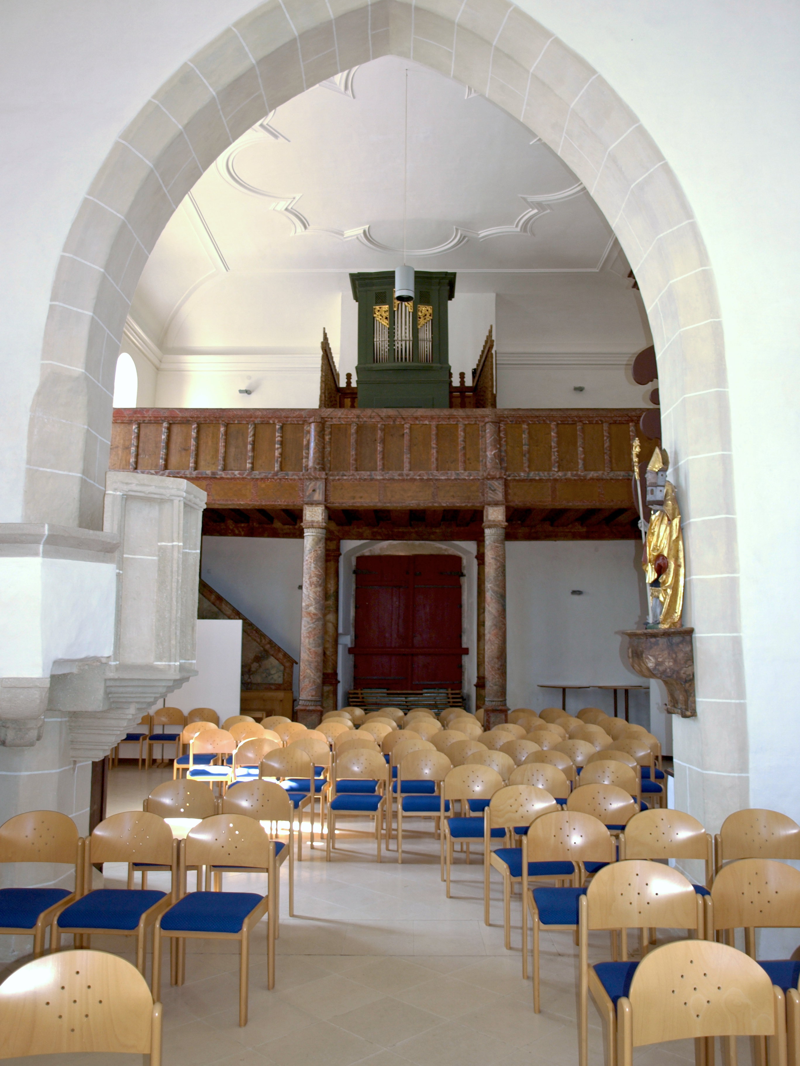 Kath. Filialkirche hl. Wolfgang